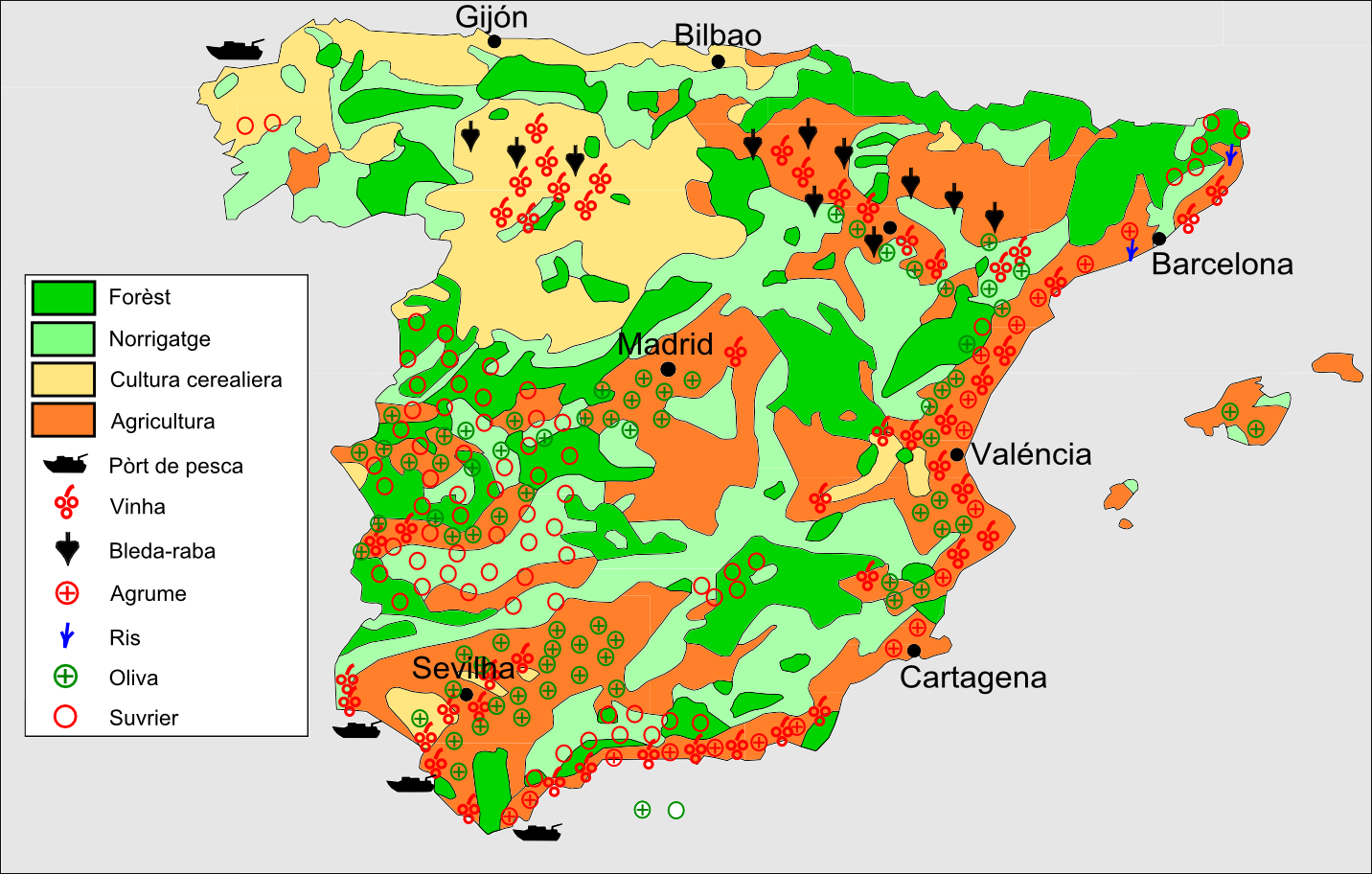 Esquèma generau de l'agricultura espanhòla.